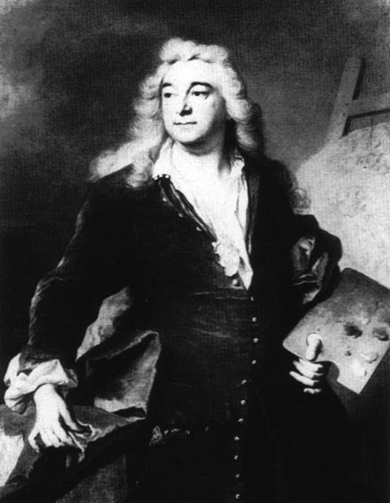 Portrait du peintre Nicolas Bertin (1667-1736) - travaillant au dessin préparatoire pour son tableau " Bacchus et Ariane "